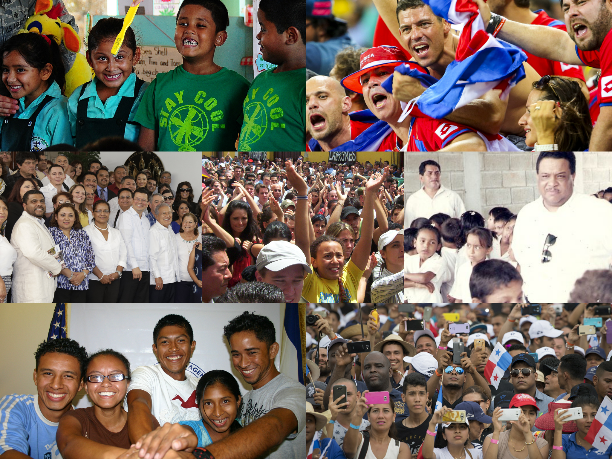 Foto montaje de distintas personas provenientes de todos los países de América Central en orden alfabético de arriba abajo y de izquierda a derecha.